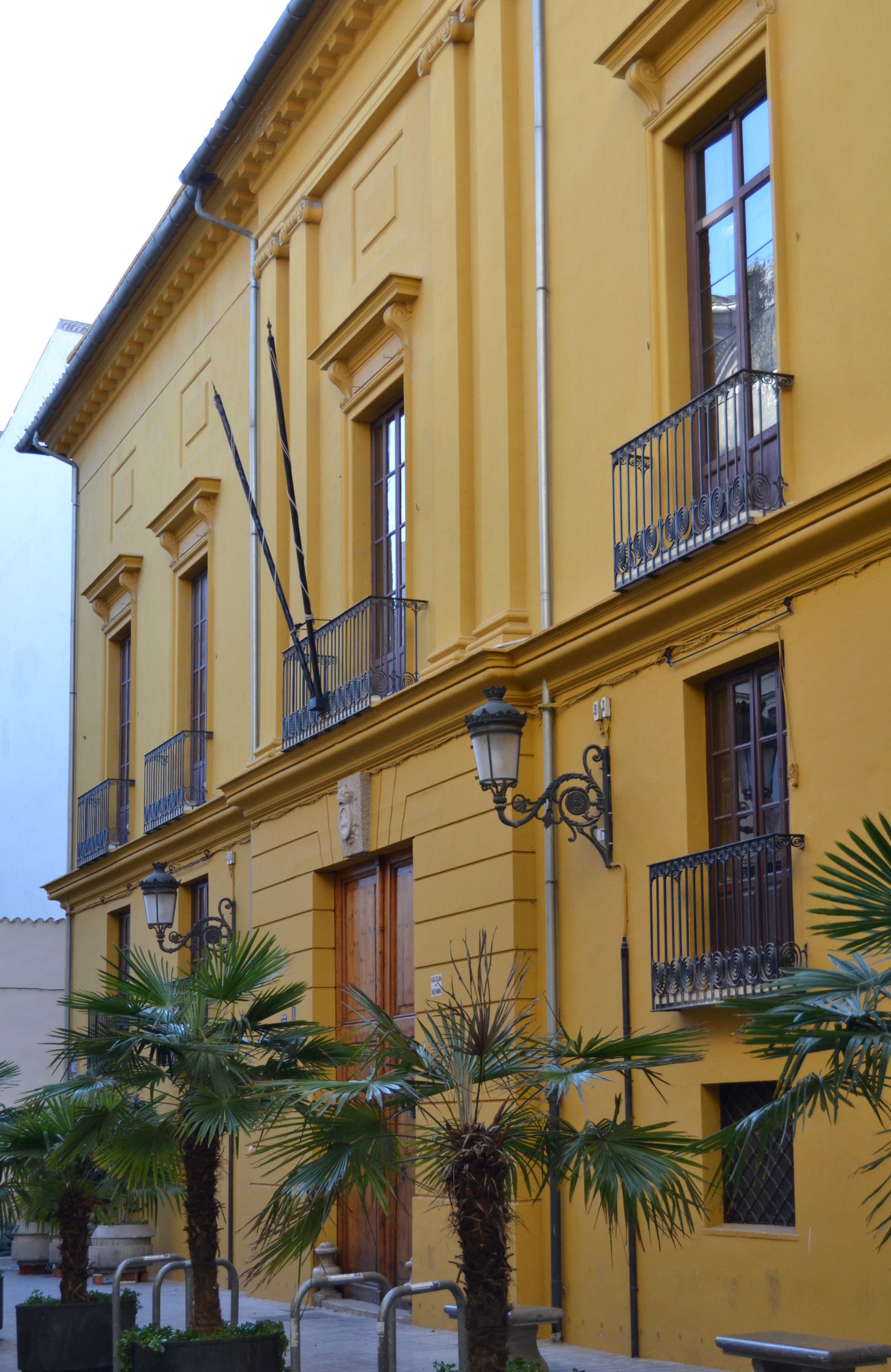 Palau de la Reial Maestrança de Cavalleria, València.